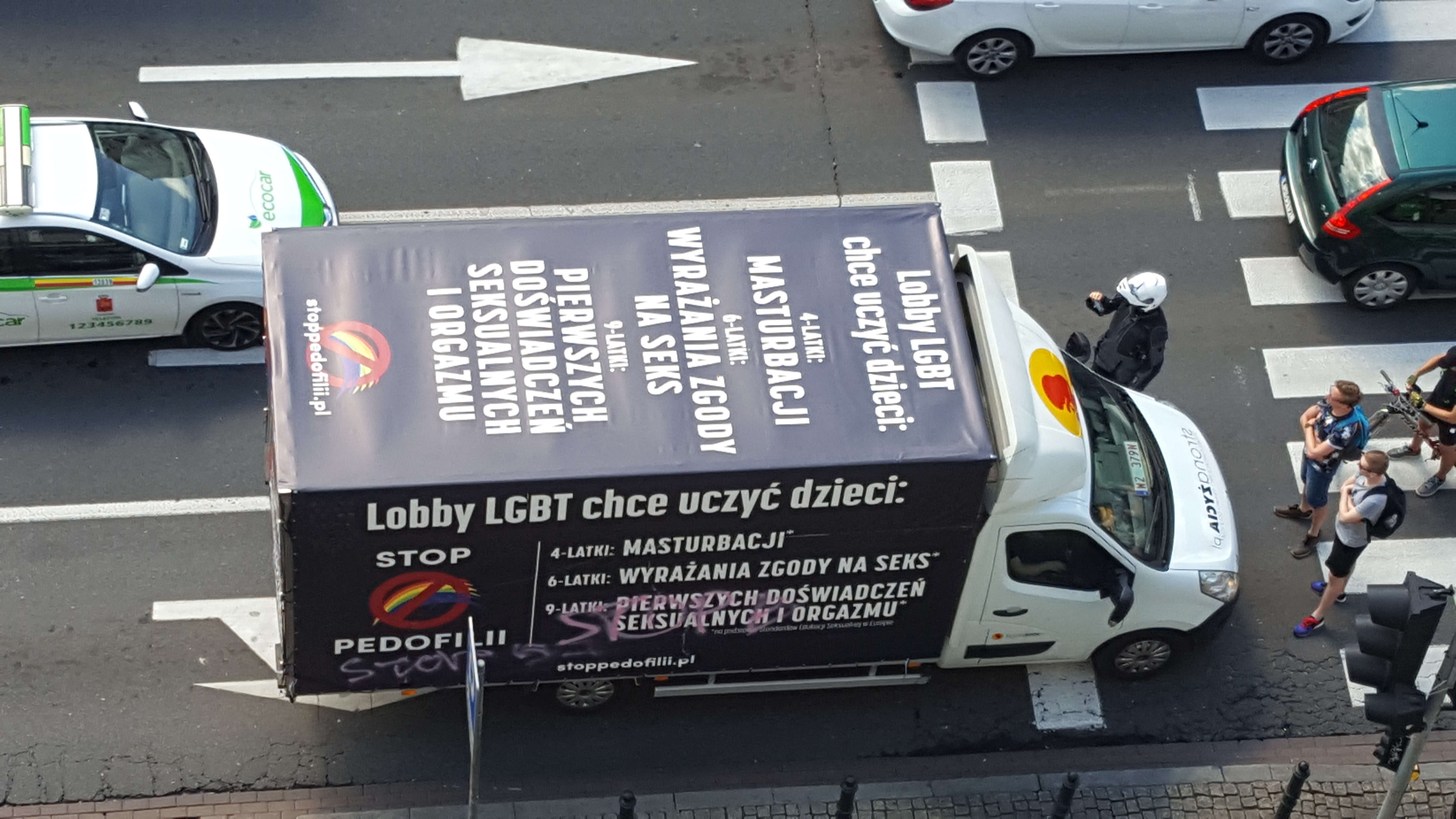 Stop Pedofilii, Warsaw,1